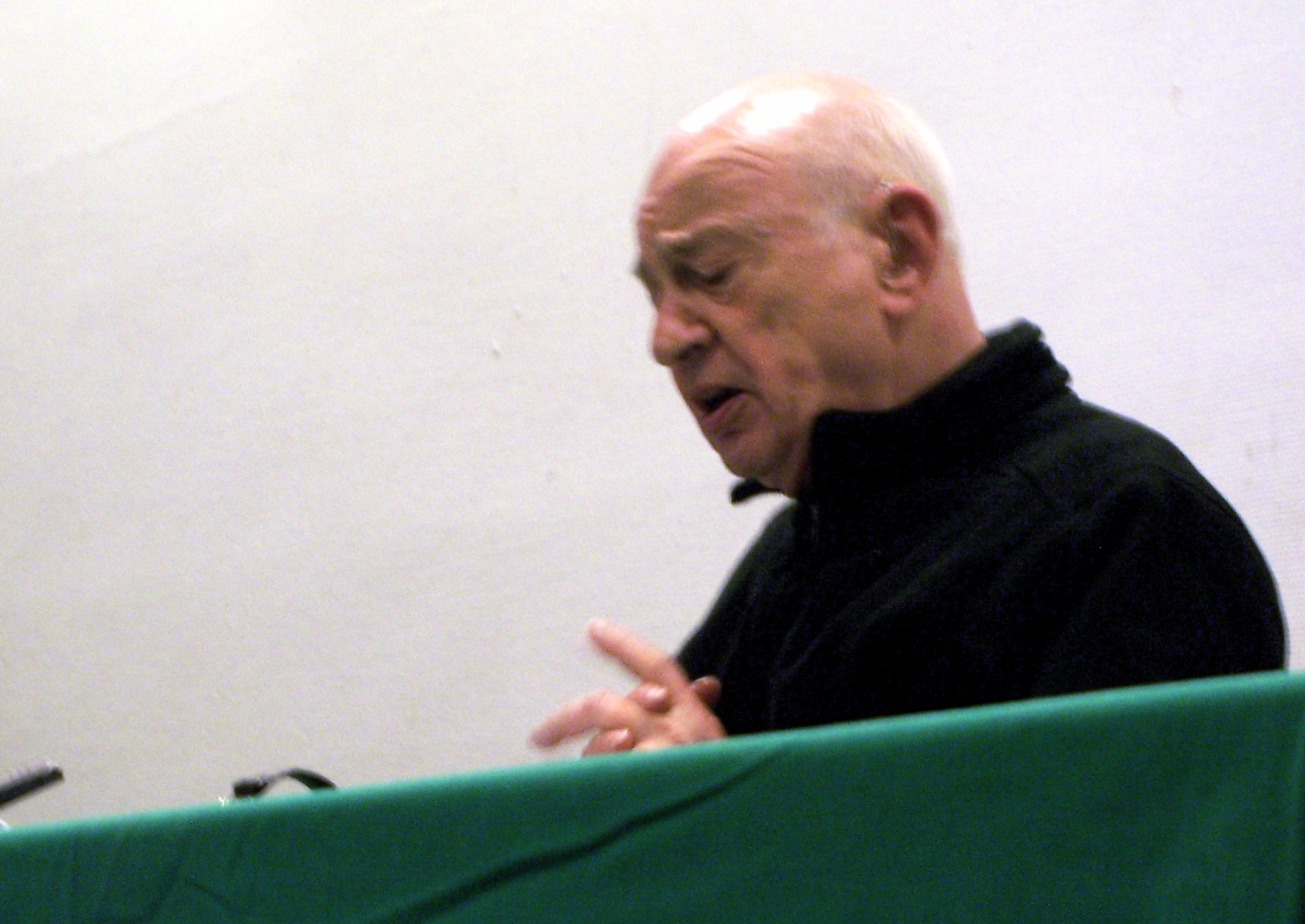 Débat du réseau intelligence de la complexité : reliance des connaissances et des actions.